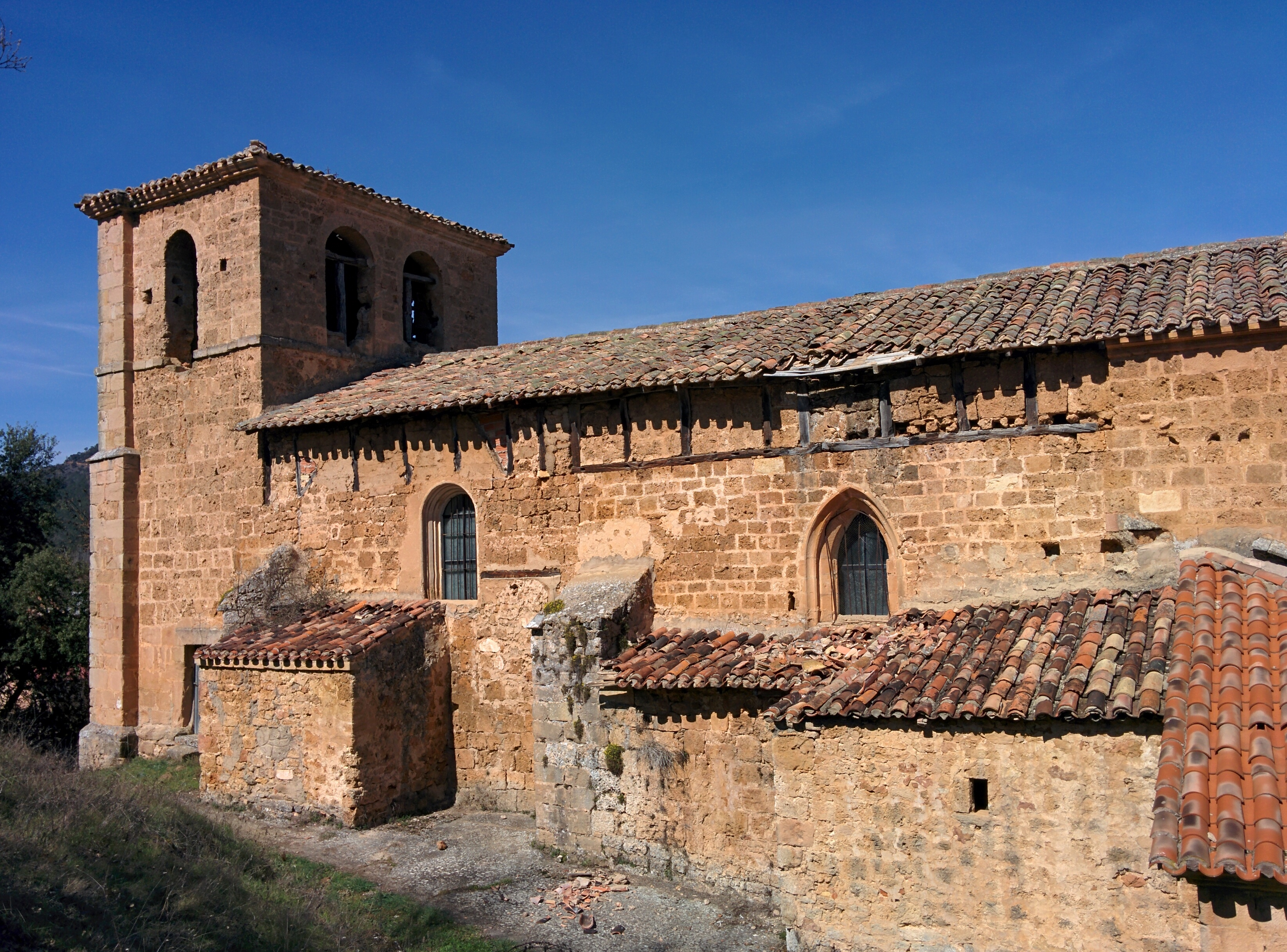 Iglesia de San Mamés Mártir, en Padrones de Bureba (Burgos, España).